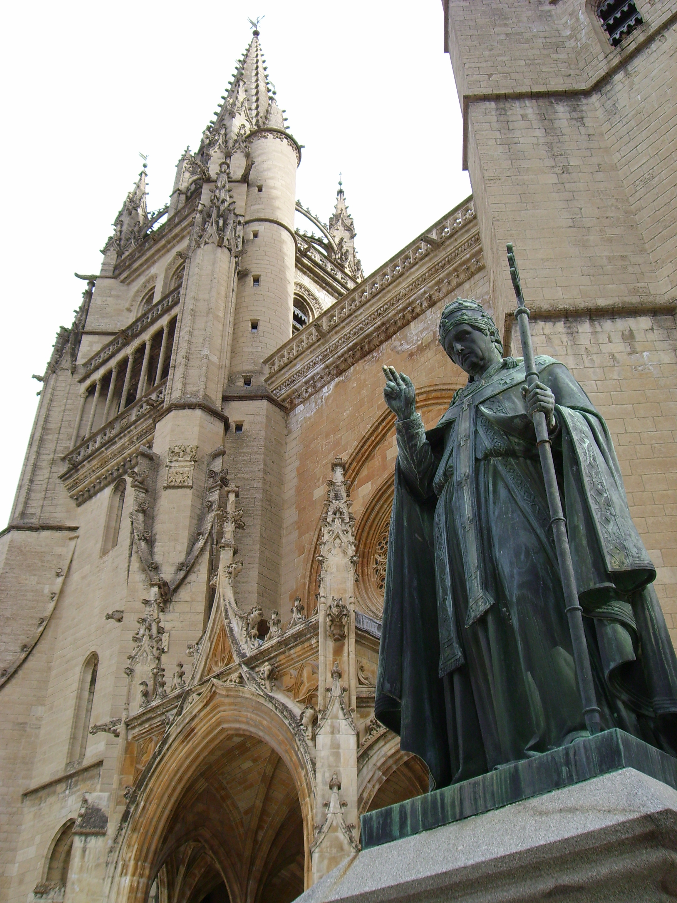 Cathédrale de Mende (Lozère) : statue du pape Urbain V